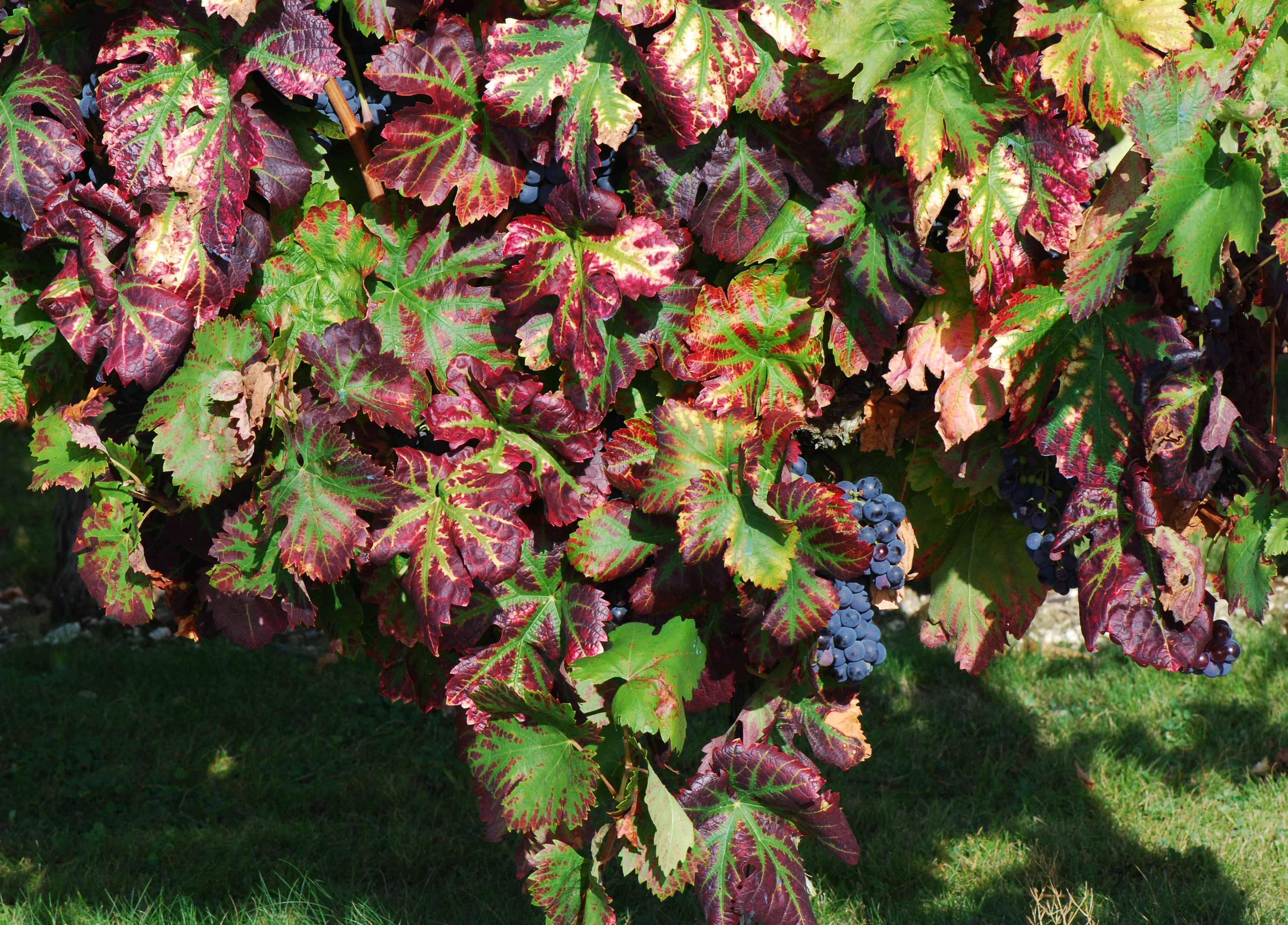 Carignan, Conservatoire du vignoble charentais, Cherves